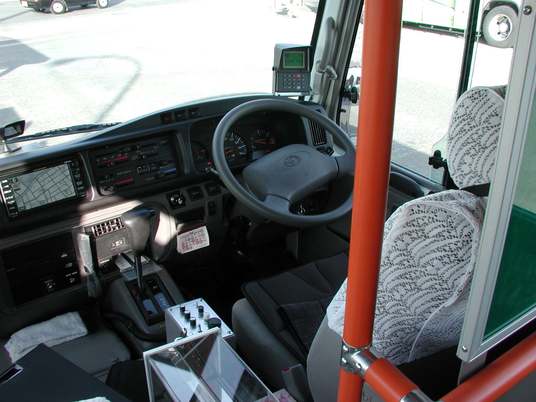 トヨタ・コースターウェルキャブ：運転席（標準LX=タイプIII(BDG-XZB40-VTPENT )/埼京タクシー：「戸田市コミュニティバス『toco』」美笹循環）